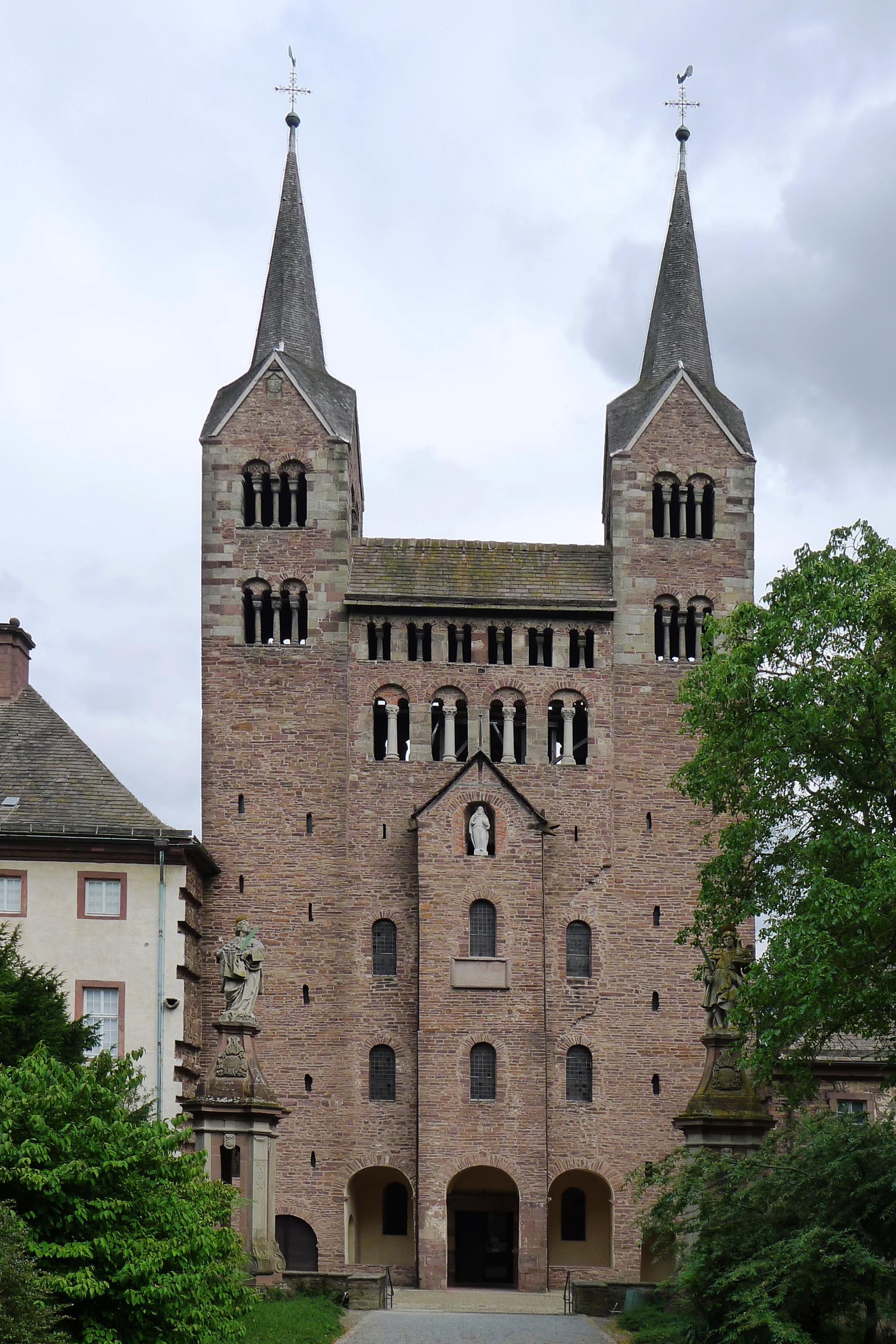 Westwerk mit Eingang zur Abteikirche